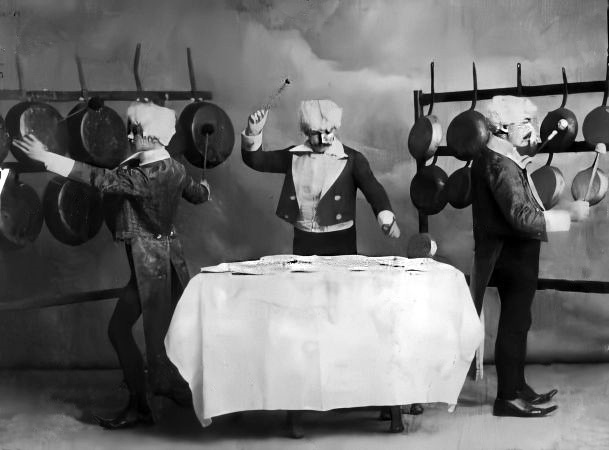 Grupo español de música, activo entre 1874 y 1899. Actuaban con instrumentos informales, interpretando fragmentos de música clásica y popular.